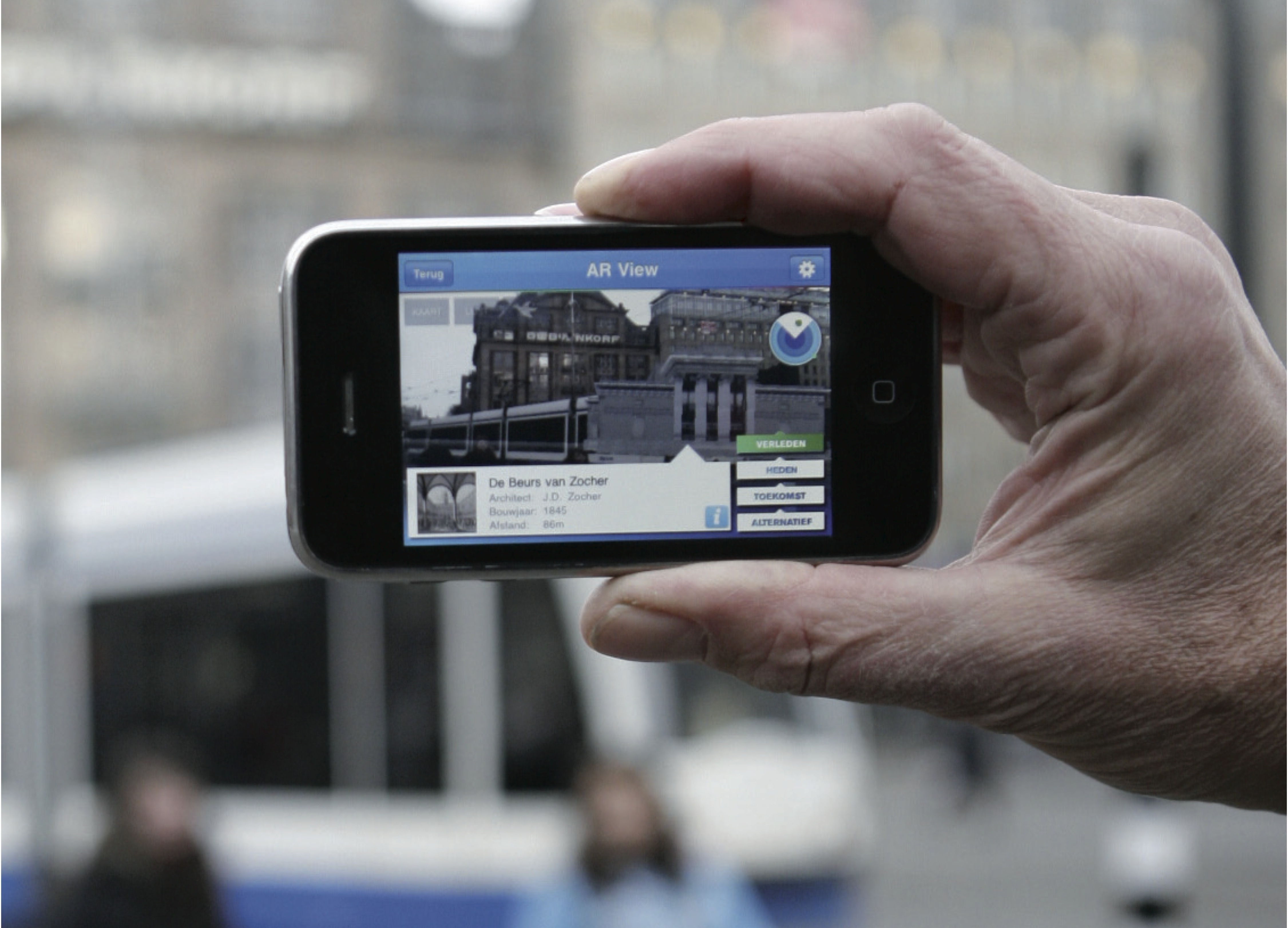 Best Practices zijn inspirerende voorbeelden van Nederlandse e-cultuur. Met behulp van de 3D Augmented Reality architectuurapp van het NAi verschijnen digitale informatielagen op het scherm van je mobiel wanneer je deze op een gebouw of een plek in de stad richt. Project van NAi, IN10 Communication, Layar, Gemeente Rotterdam Zie voor meer informatie